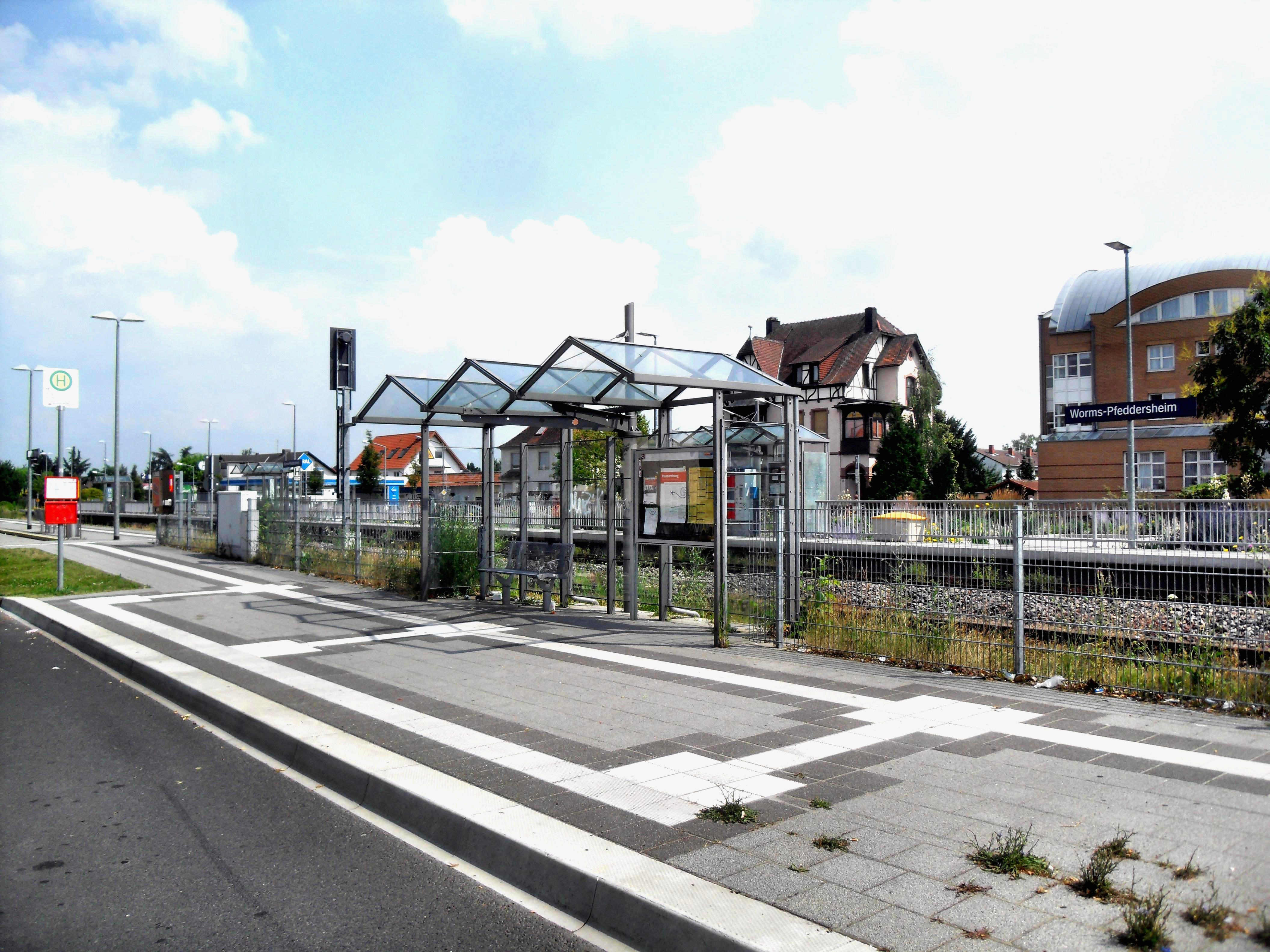 Die Bushaltestelle des Worms-Pfeddersheimer Bahnhofs in Rheinland-Pfalz, Deutschland.